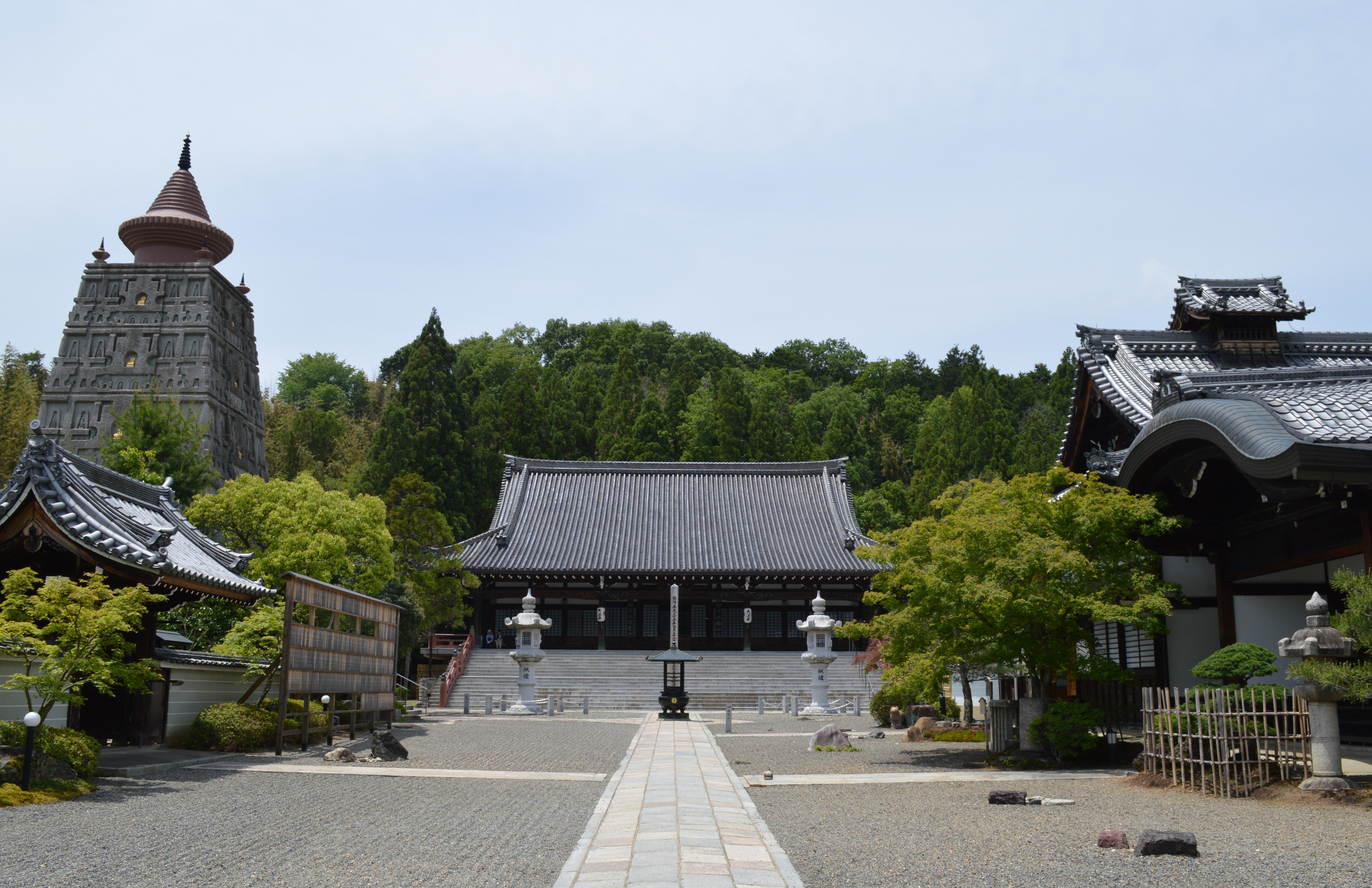 京都市左京区岩倉 顕本法華宗総本山妙満寺 本堂（中央奥）、方丈（右）、仏舎利大塔（左）